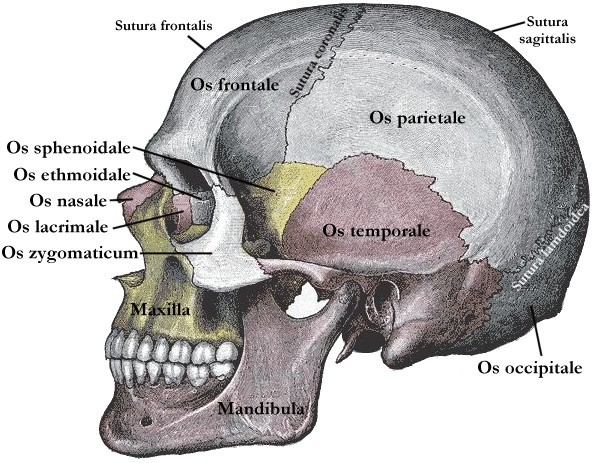 Vagusgruppe, Image:Gray188.png, nachbearbeitet und Beschriftung modifiziert (Deutsch/german) von Benutzer:Uwe Gille